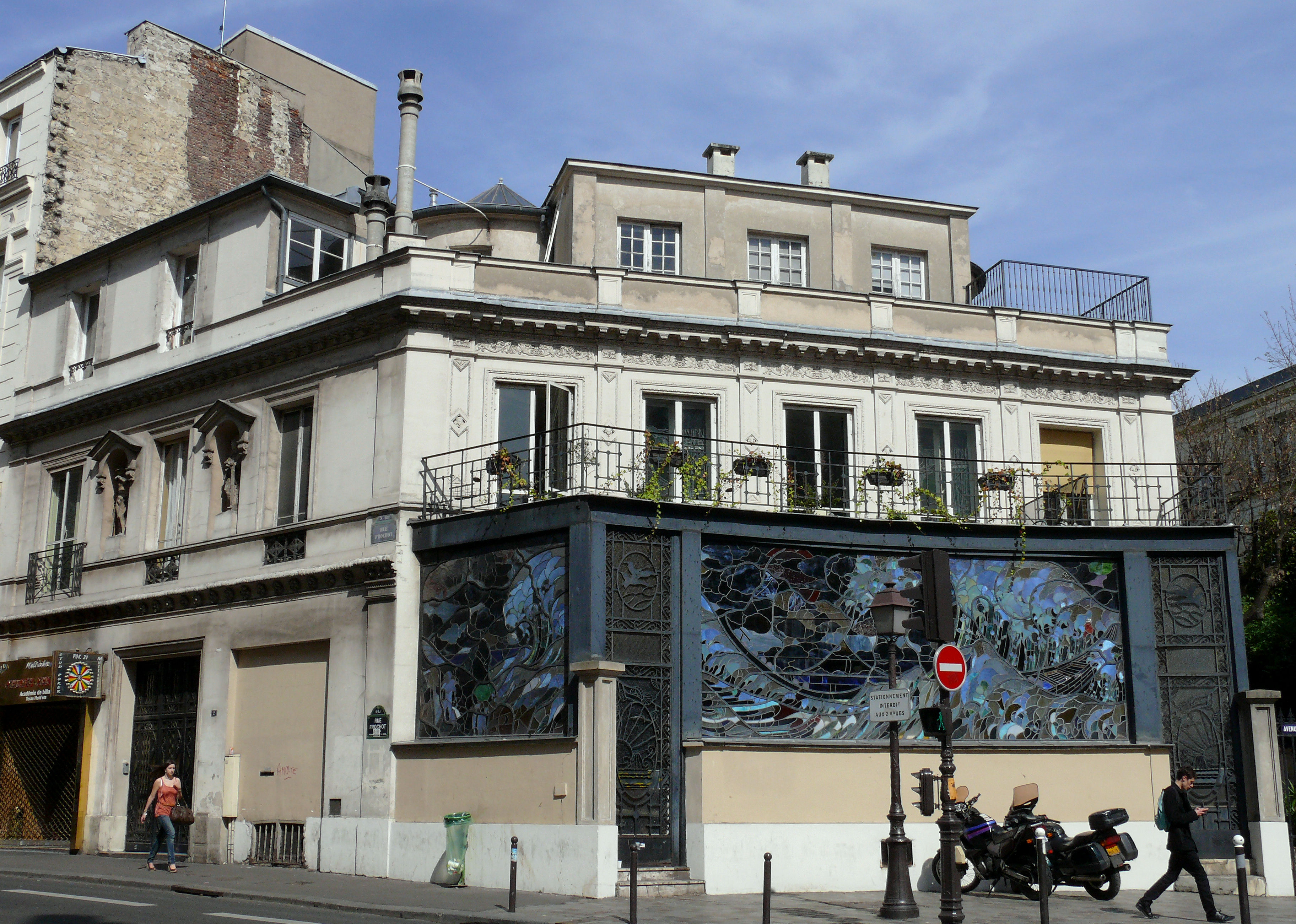 Paris 9ème arrondissement - Immeuble 28 rue Victor-Massé et rue Frochot